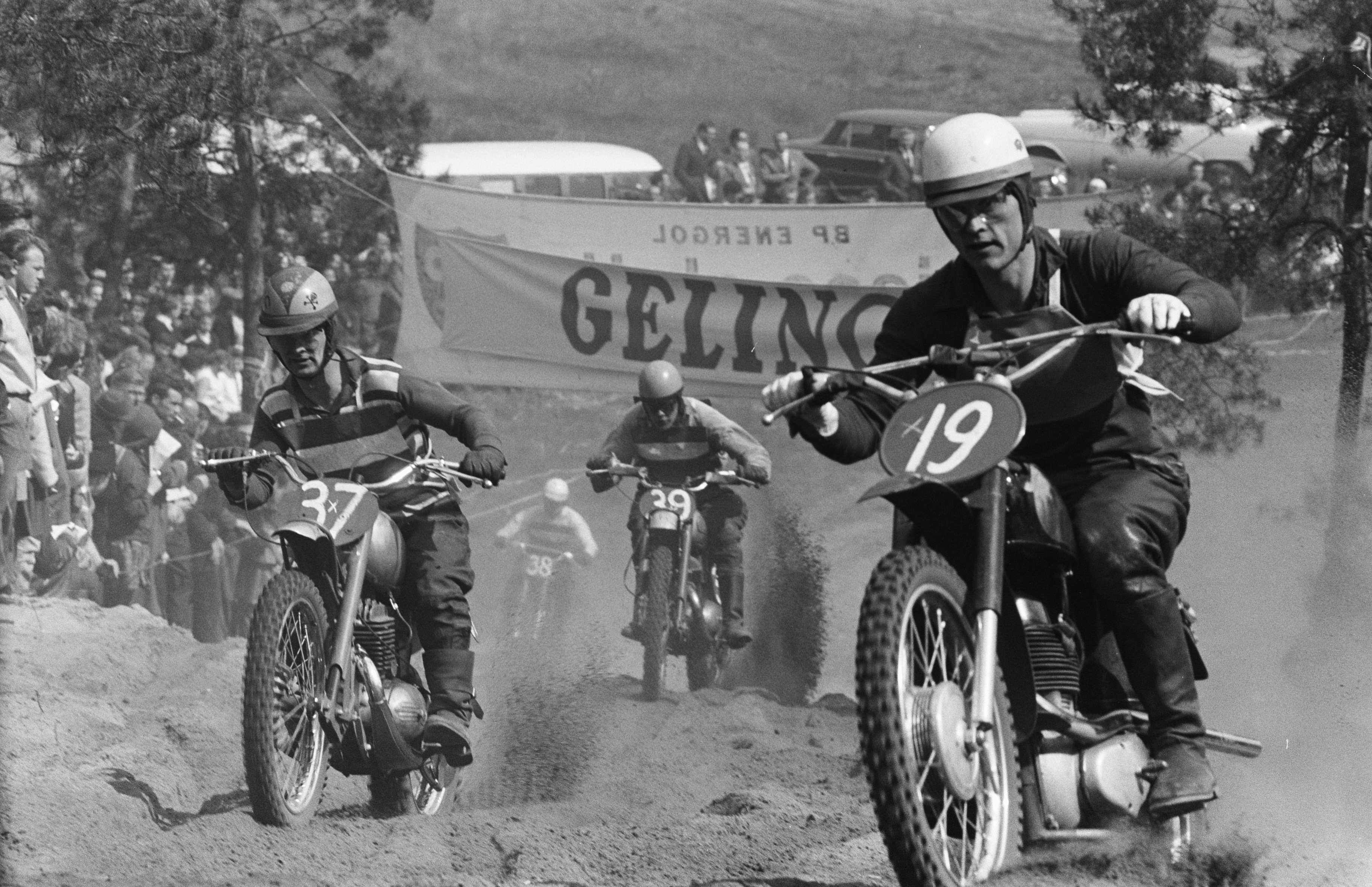 Collectie / Archief : Fotocollectie Anefo Reportage / Serie : [ onbekend ] Beschrijving : Motorcros 1962 De Zandberg te Bergharen Datum : 3 juni 1962 Locatie : Bergharen Trefwoorden : MOTORCROSS Fotograaf : Pot, Harry / Anefo Auteursrechthebbende : Nationaal Archief Materiaalsoort : Negatief (zwart/wit) Nummer archiefinventaris : bekijk toegang 2.24.01.05 Bestanddeelnummer : 913-9880